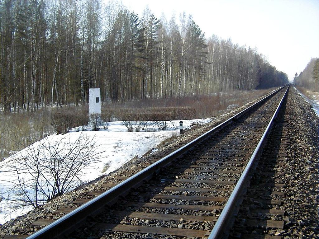 Jelgavas apkārtne, piemineklis partizāniem 2003-03-08